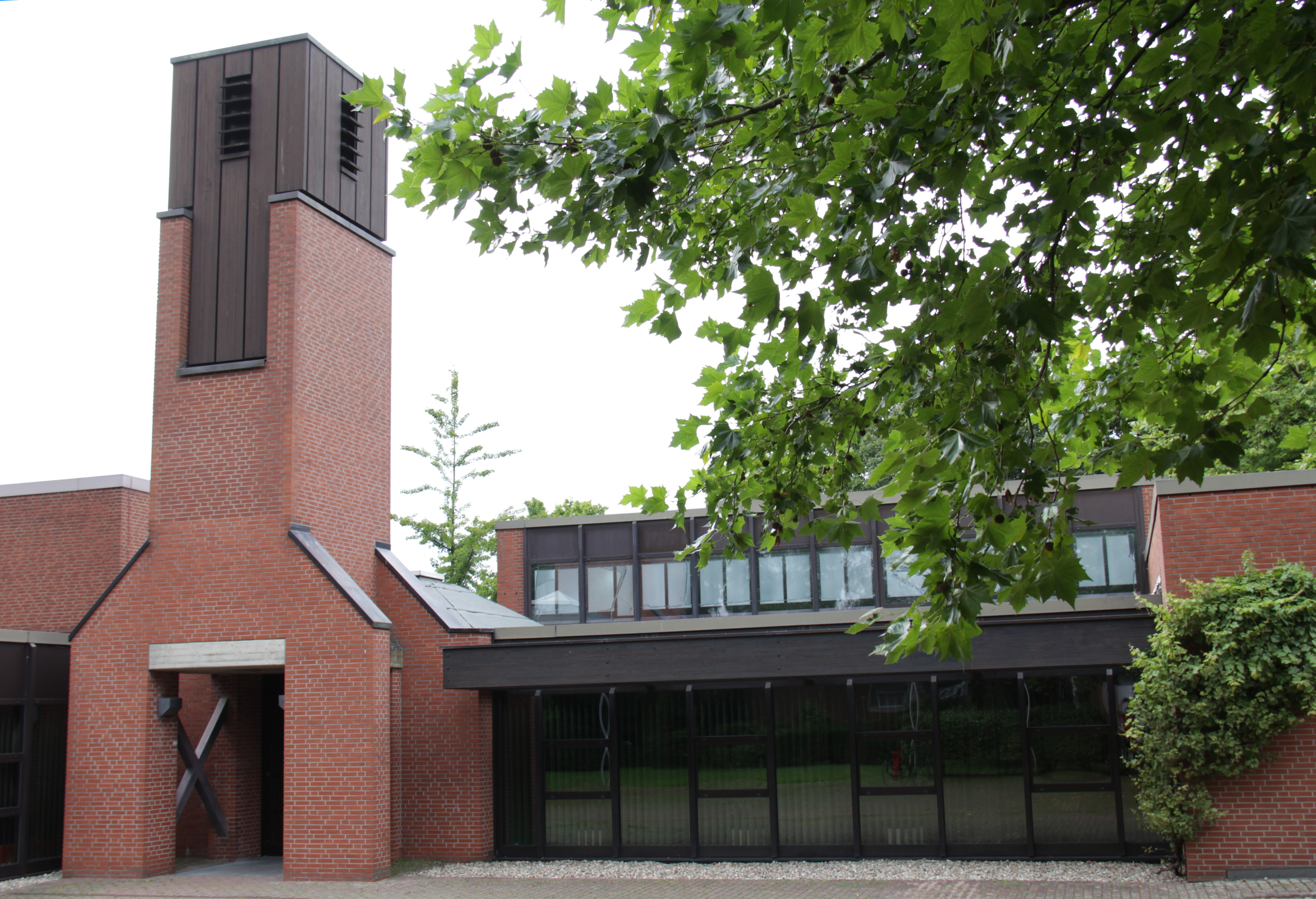 Andreaskirche in Münster/Westfalen, Stadtteil Coerde